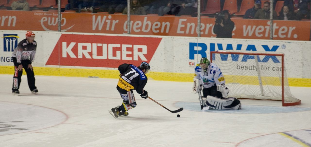 Sébastien Bordeleau schiesst einen Penalty gegen Adam Munro (SC Bern gegen Fribourg-Gottéron)